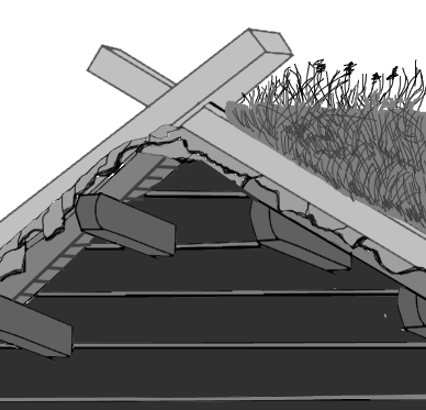 Décoration de pignon sur toiture végétale, Norvège.